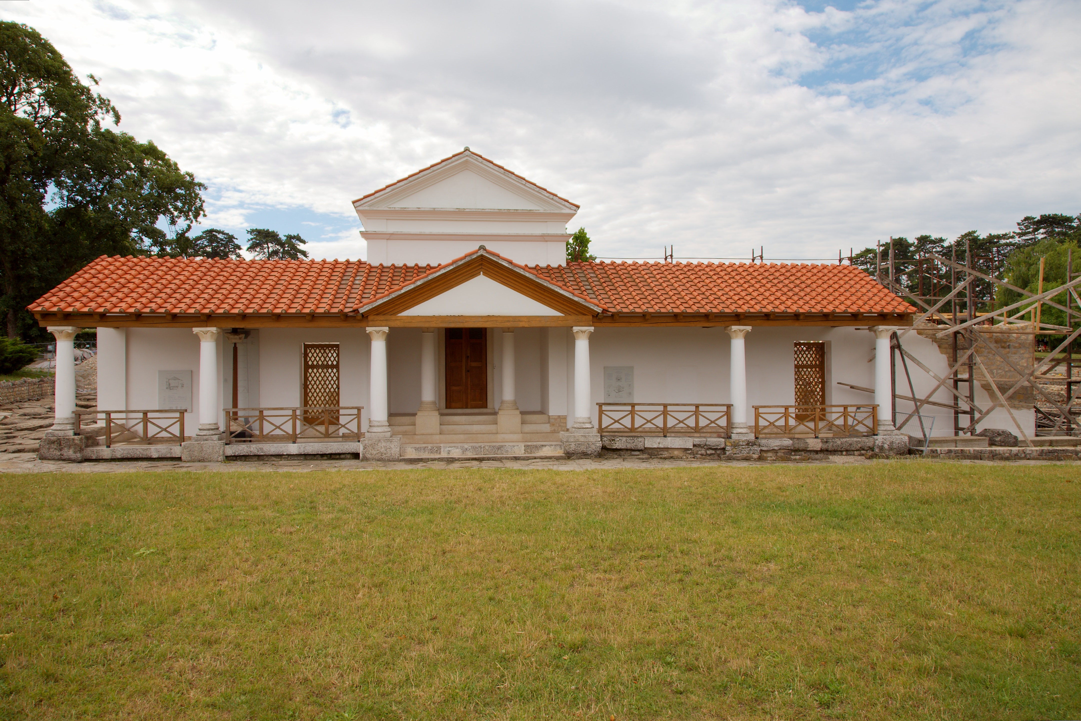 Nordfront der zu diesem Zeitpunkt erst teilweise wiederaufgebauten Stadtvilla ( Villa Urbana) in Carnuntum. Früher wurde angenommen, daß es sich bei diesem Teil des Baus um einen Tempel, evtl. der Diana, handle. Die anderen Bilder der Villa Urbana stammen aus der nunmehr fertiggebauten Rekonstruktion!